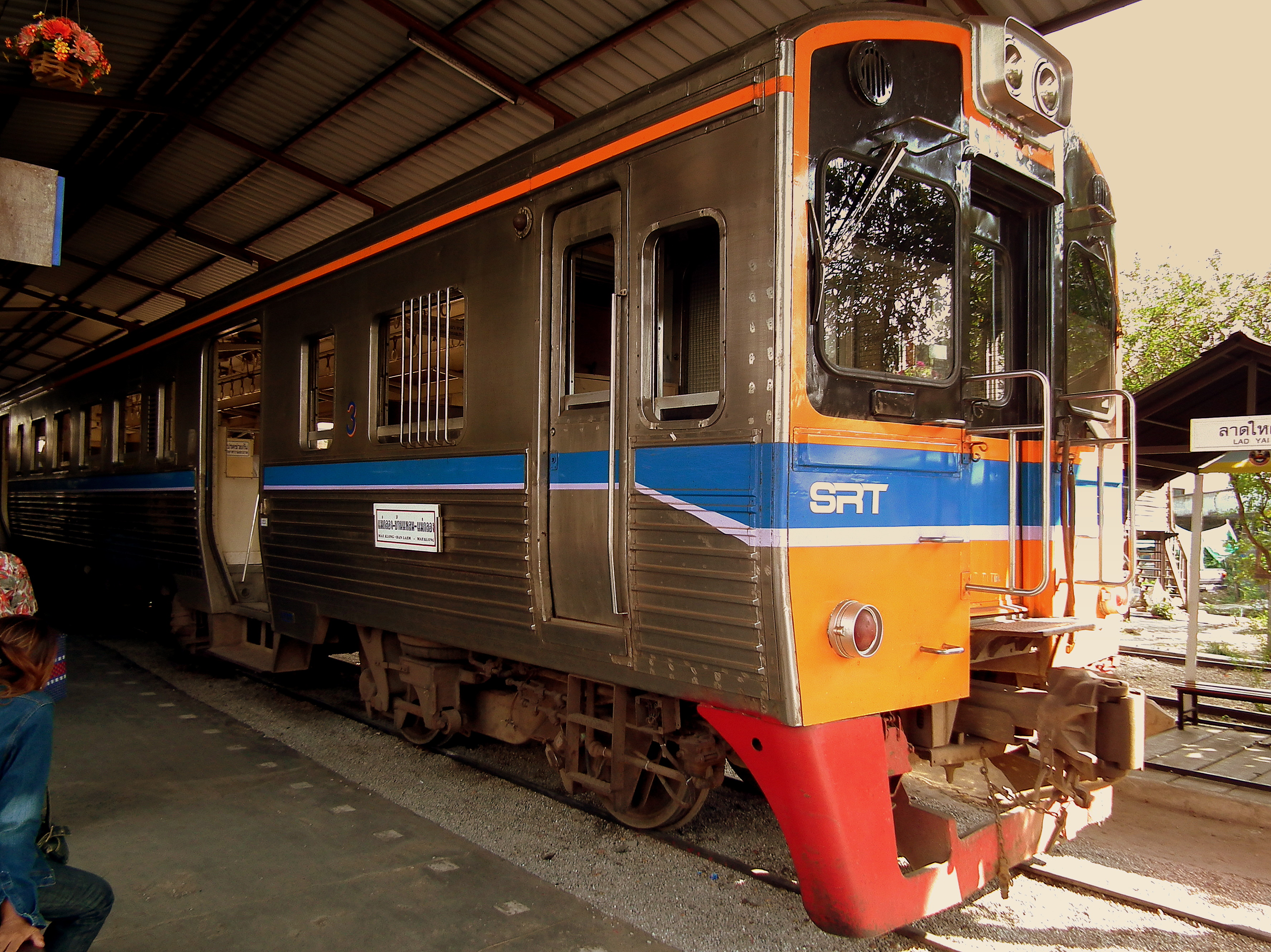 MAEKLONG STATION THAILAND JAN 2012